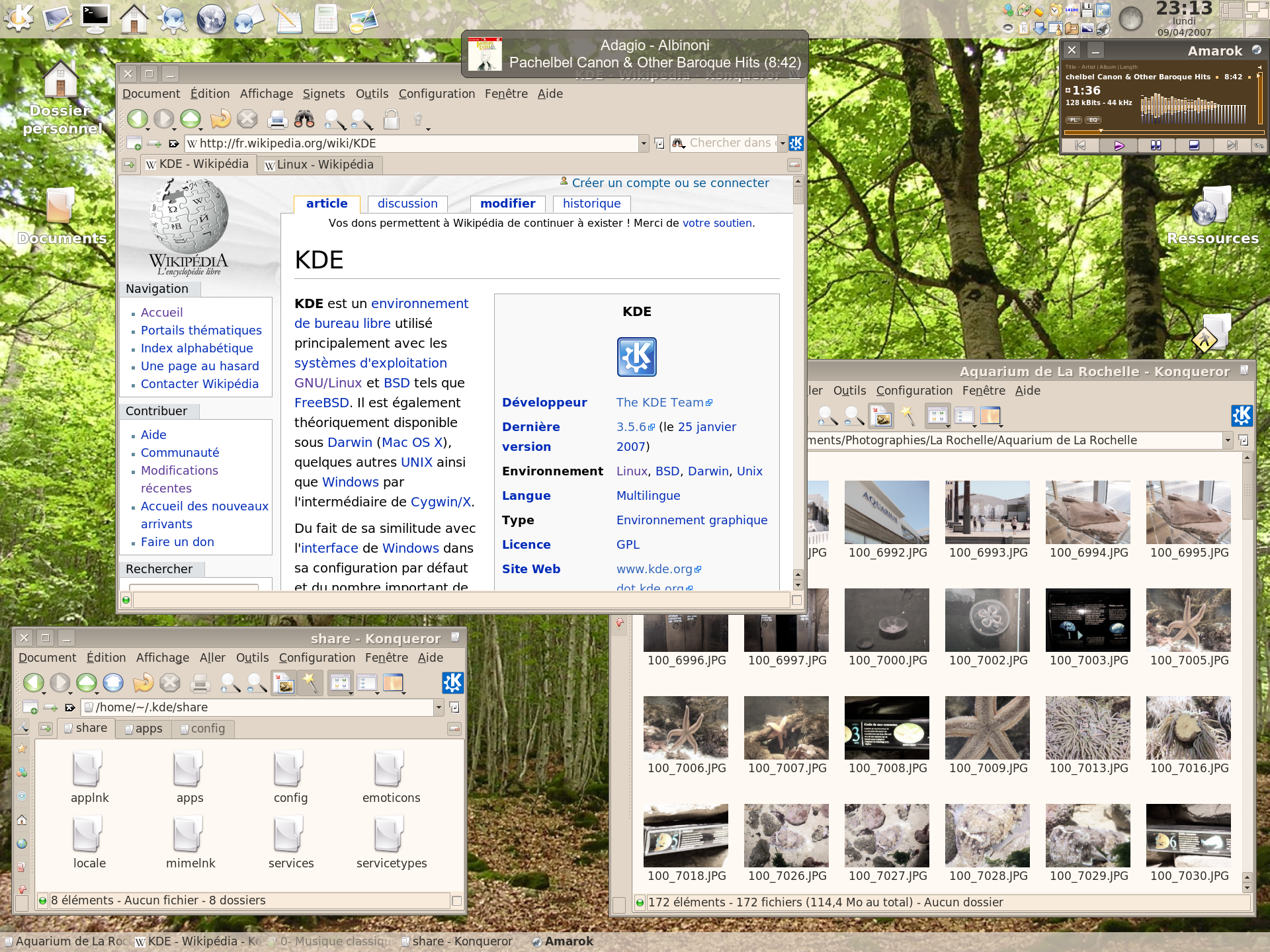 Capture d'écran d'une version personnalisée de l'environnement de bureau KDE (dans sa version 3.5.5) sous Linux, saveur Debian.